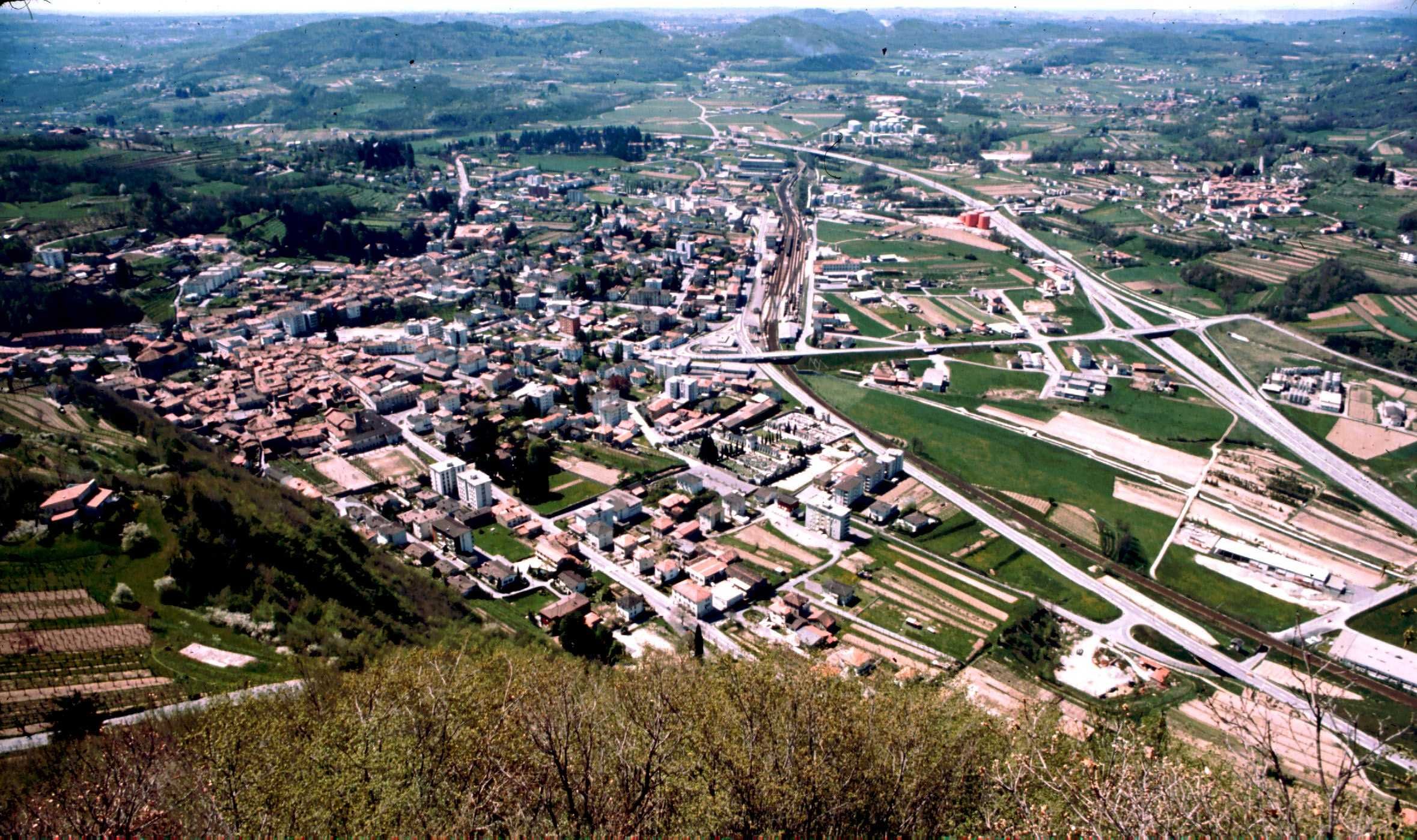 Celso Mosca, Mendrisio, panorama (inizio anni '70). L'attuale panorama è molto diverso, a causa di una forte edificazione della "Piana di San Martino" e del completo rifacimento dello svincolo autostradale, che sarà nuovamente rifatto negli anni 2010-2012.